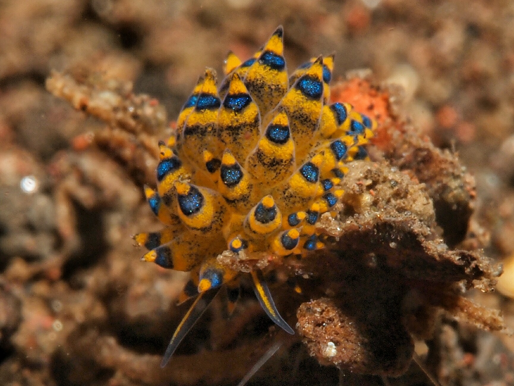 Stiliger ornatus